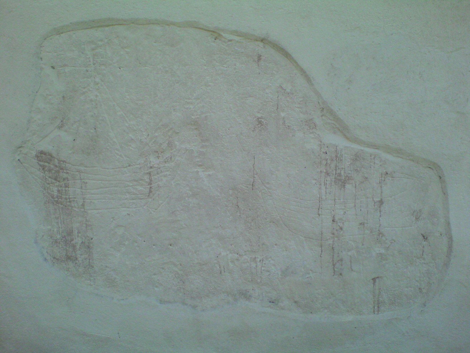 Skeppsristning på väggen av Tveta kyrka, Hultsfreds kommun.